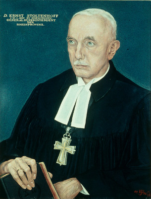 Foto eines Porträts von Ernst Stoltenhoff, gemalt von Werner Schramm, 1936